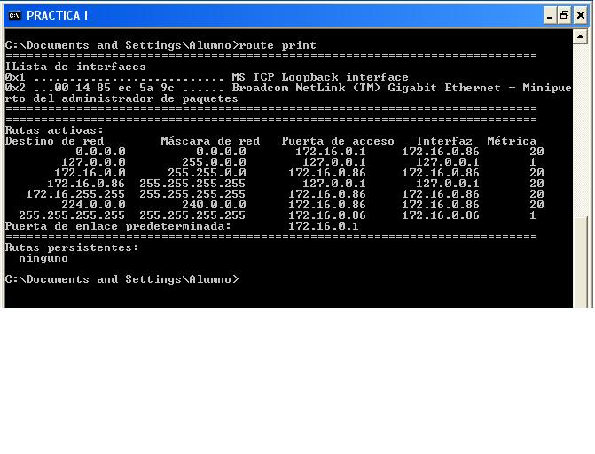 tabla de enrutamiento obtenida a traves del CMD de windows xp